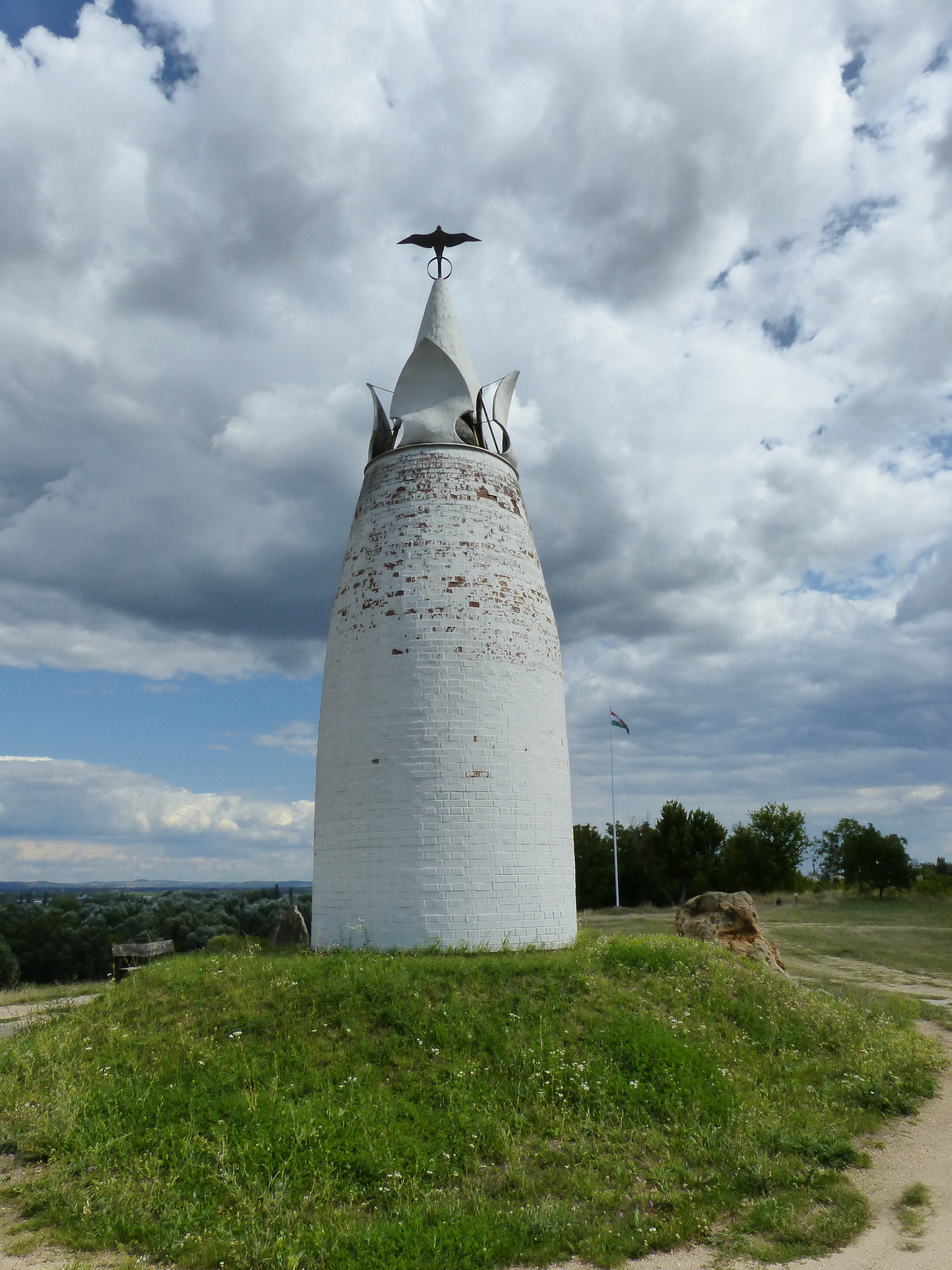 Teleki Honalapítási Emlékmű. A felvétel 2017. augusztus 21-én, hétfőn készült Pomázon, a Klissza-dombon.